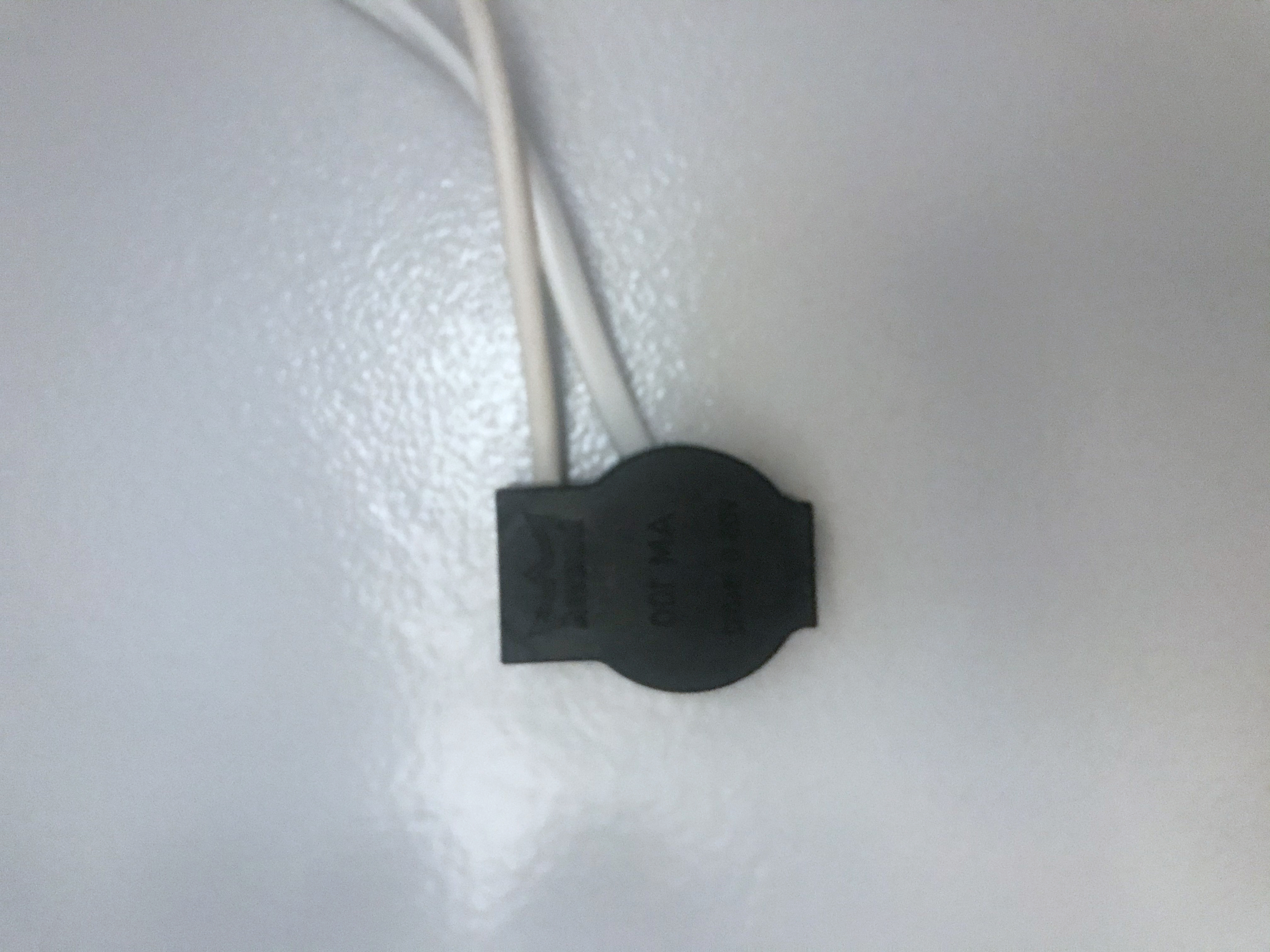 Ein Dorma AM 115 Abreißmelder (passiv) an einer Rückwandbefestigung eines Hartmann Tresor Klasse 1 nach EN 1143-1